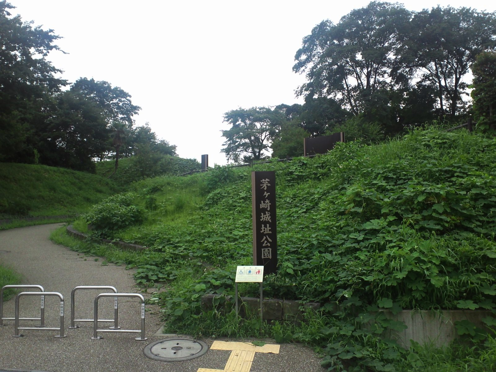 茅ヶ崎城跡公園（神奈川県横浜市）